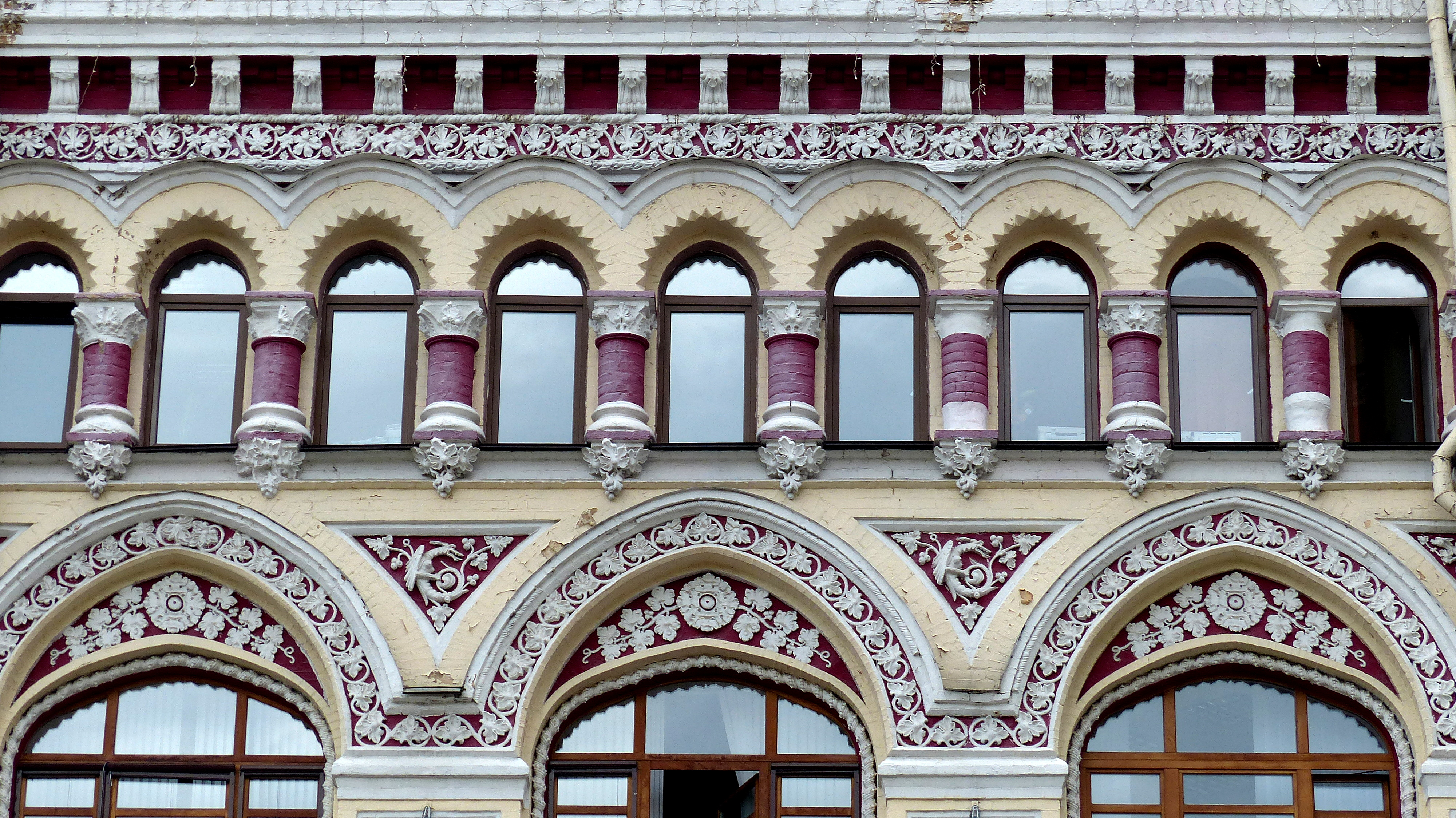 Будинок прибутковий, в якому містилася чоловіча гімназія № 8, в якій у 1915-1919 рр. навчався Лифар С., артист балету; викладали професори: Титов Ф. І., історик, Артоболевський В. М., зоолог; та ін., Київ, Франка Івана пл., 5